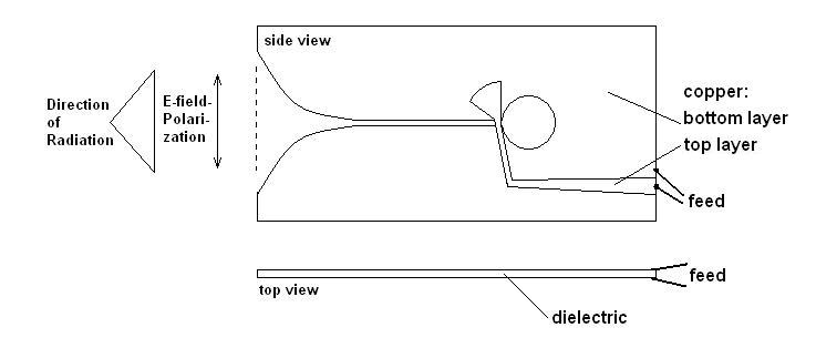 Vivaldi Antenna pattern